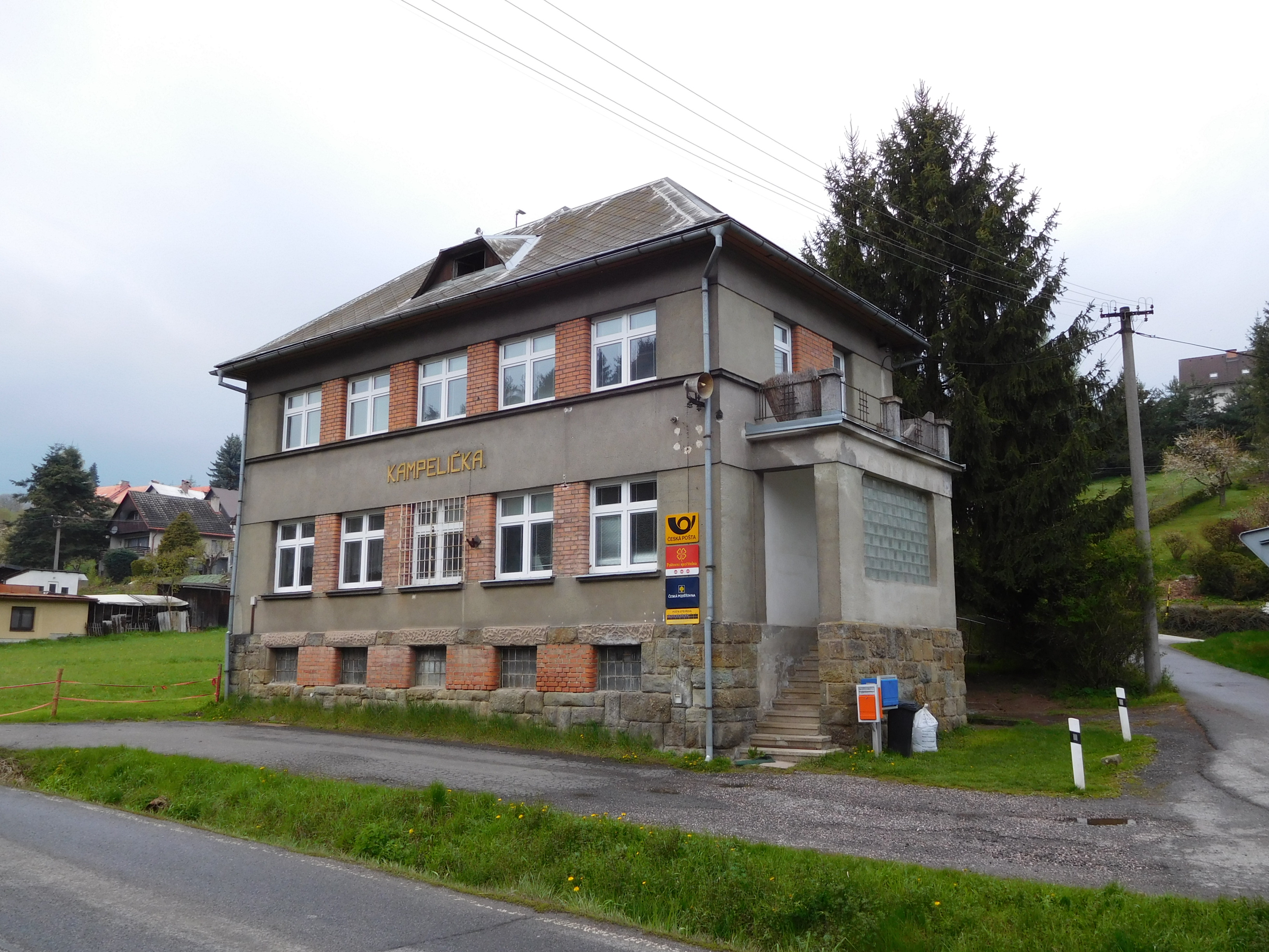 Nedvězí - dům č.p. 62, pošta